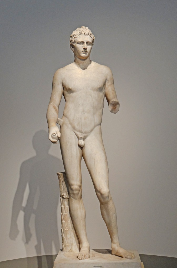 Statue d'un athlète victorieux, appelé l'athlète de Berlin Statue romaine d'après un original grec daté de 320-310 av. J.C. Marbre L'avant-bras droit et la main sont récents Acquise en 1768 à Rome pour Frédéric II Altes Museum